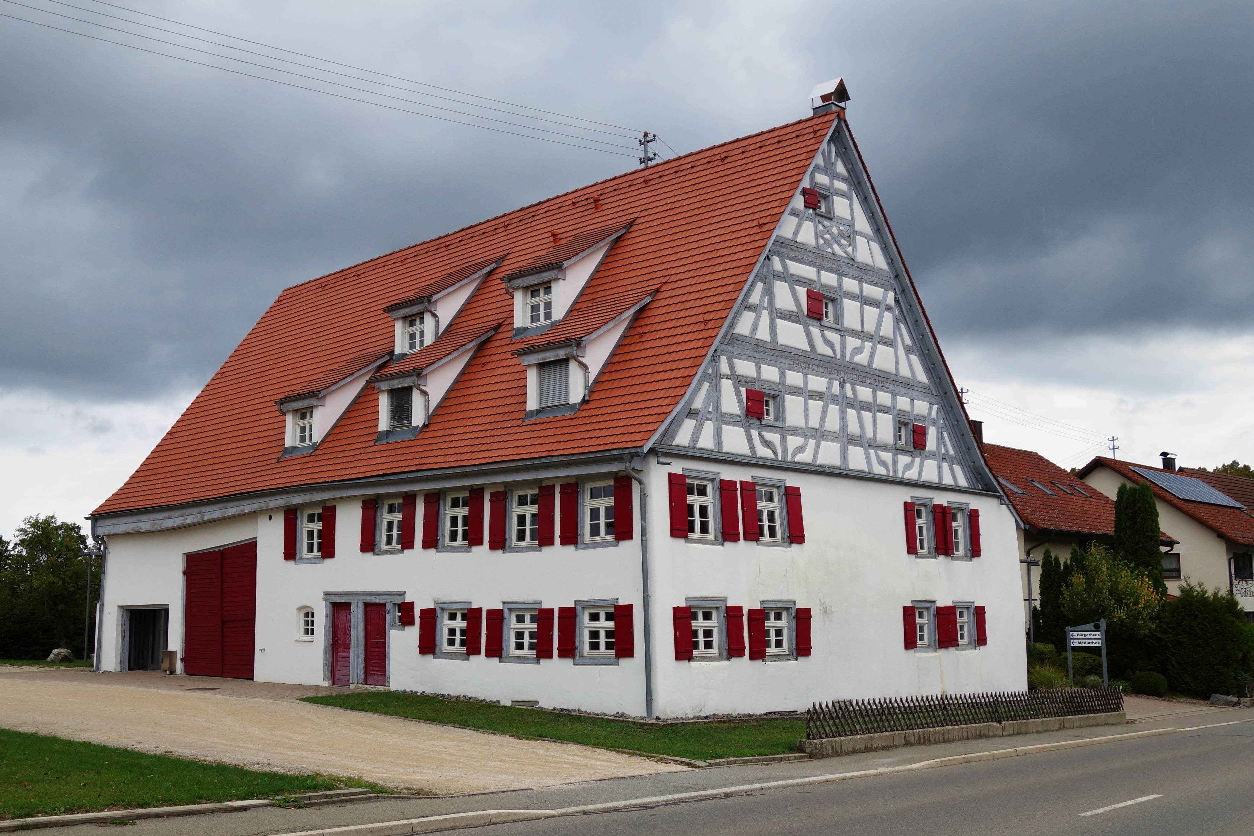 Bürgerhaus denkingen, Hauptstraße 37